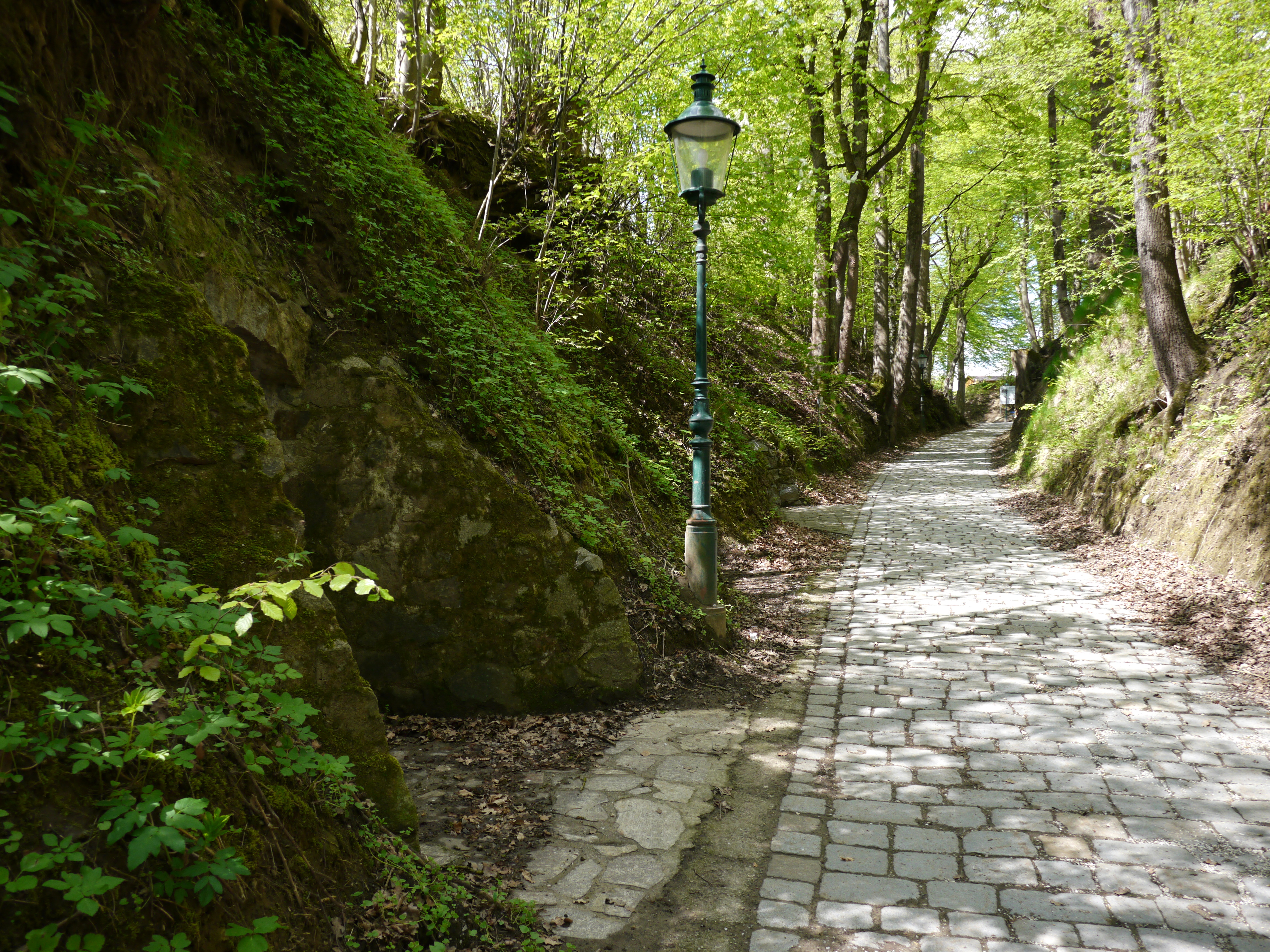 Kellergröppen Raab